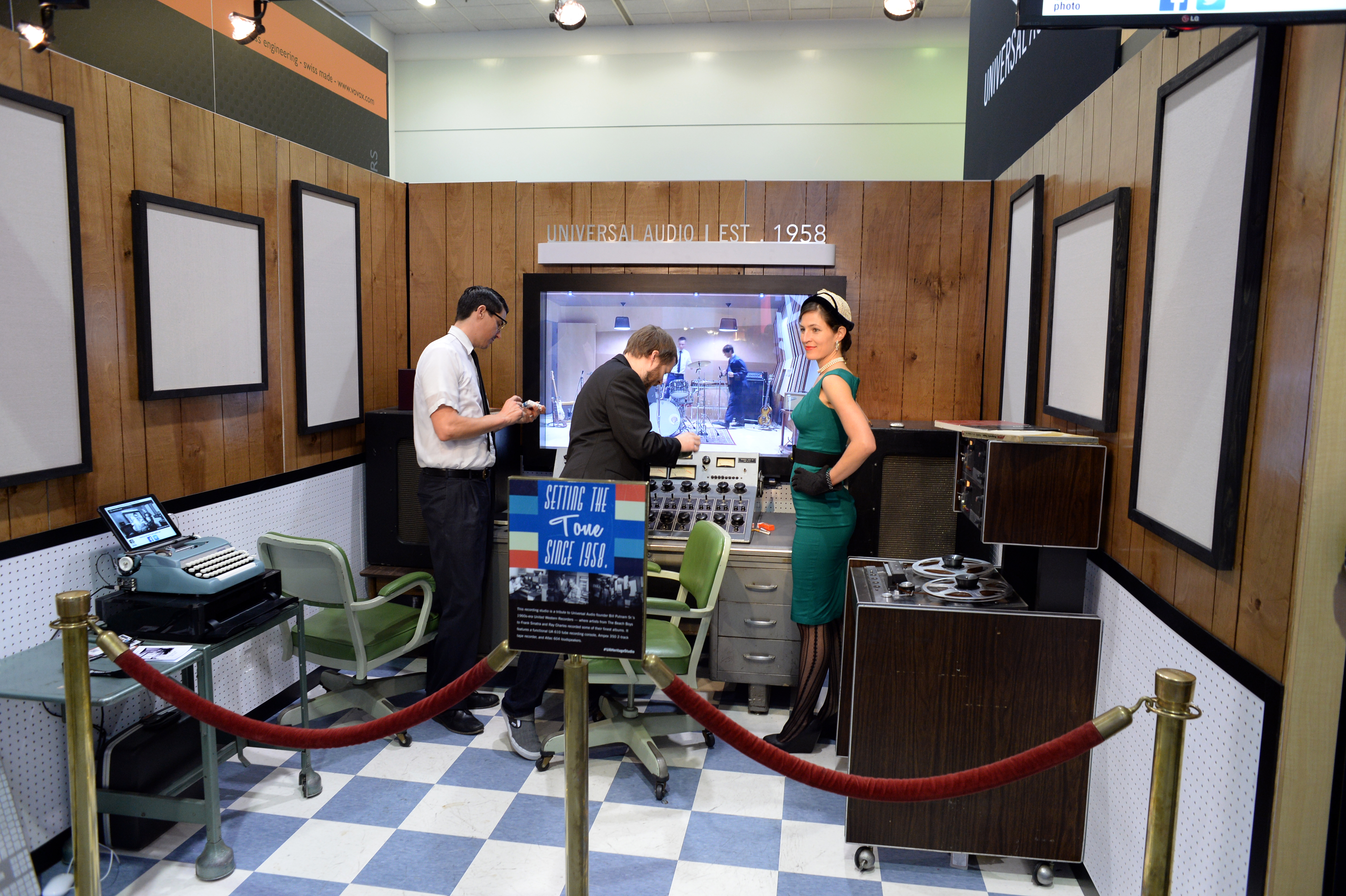 UA Vintage Studio